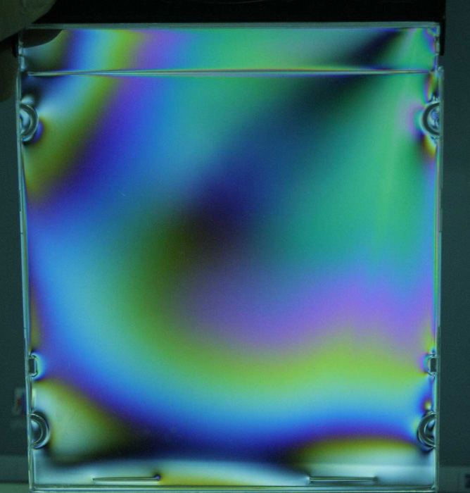 Polarized LCD Panel